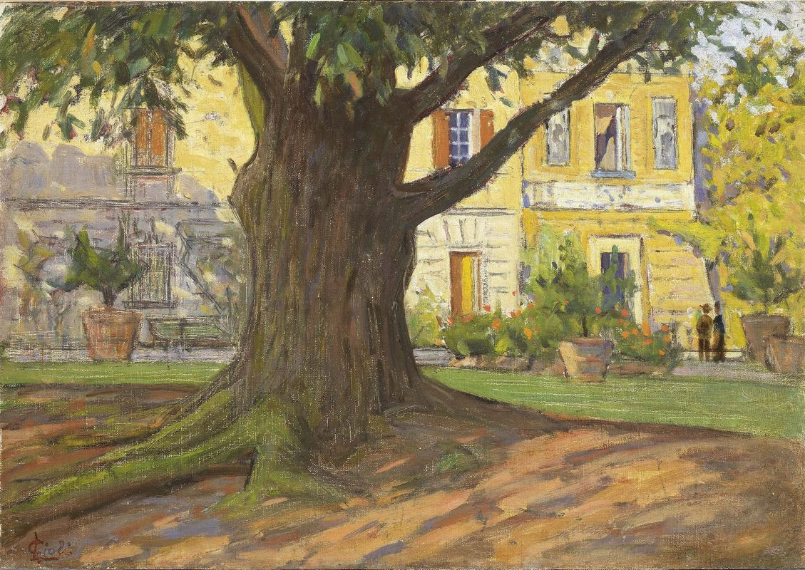 Luigi Gioli Casa del pittore a Fauglia. Olio su tela applicata su cartone, cm. 30,7x43,7. Firma in basso a sinistra: L. Gioli.